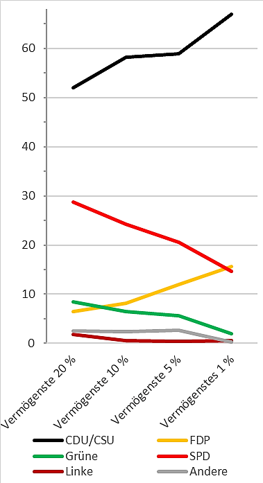 Basierend auf Daten aus Bach und Grabka 2013, DIW Wochenbericht Nr. 37.2013